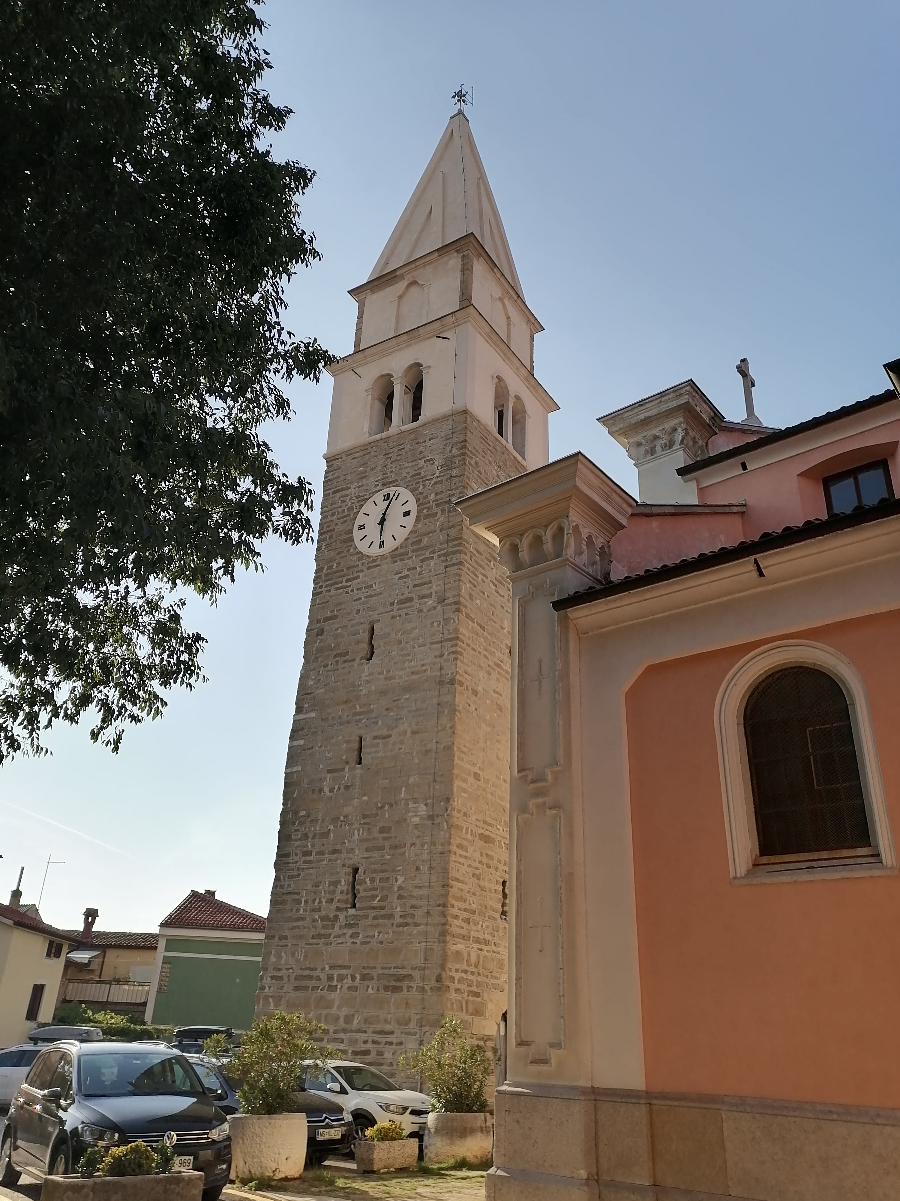 Zvonik cerkve sv. Mavra v Izoli